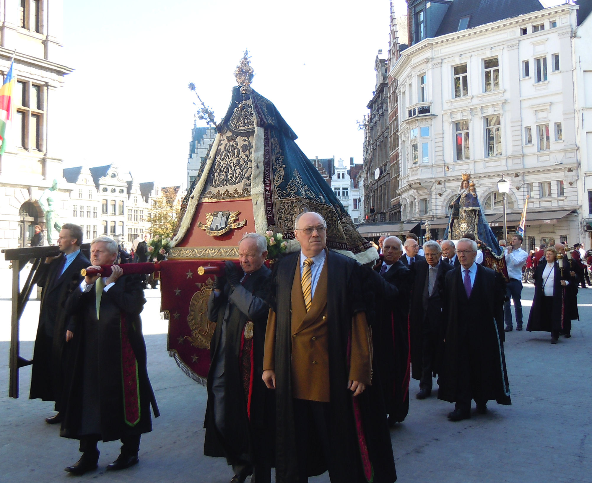 Scheldewijding